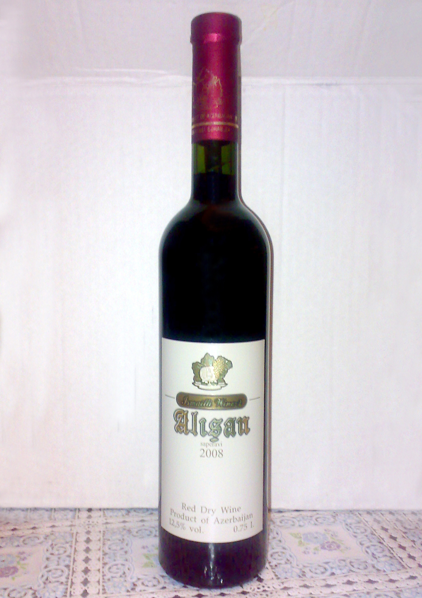 Azərbaycan şərabı. Alışan saperavi 2008